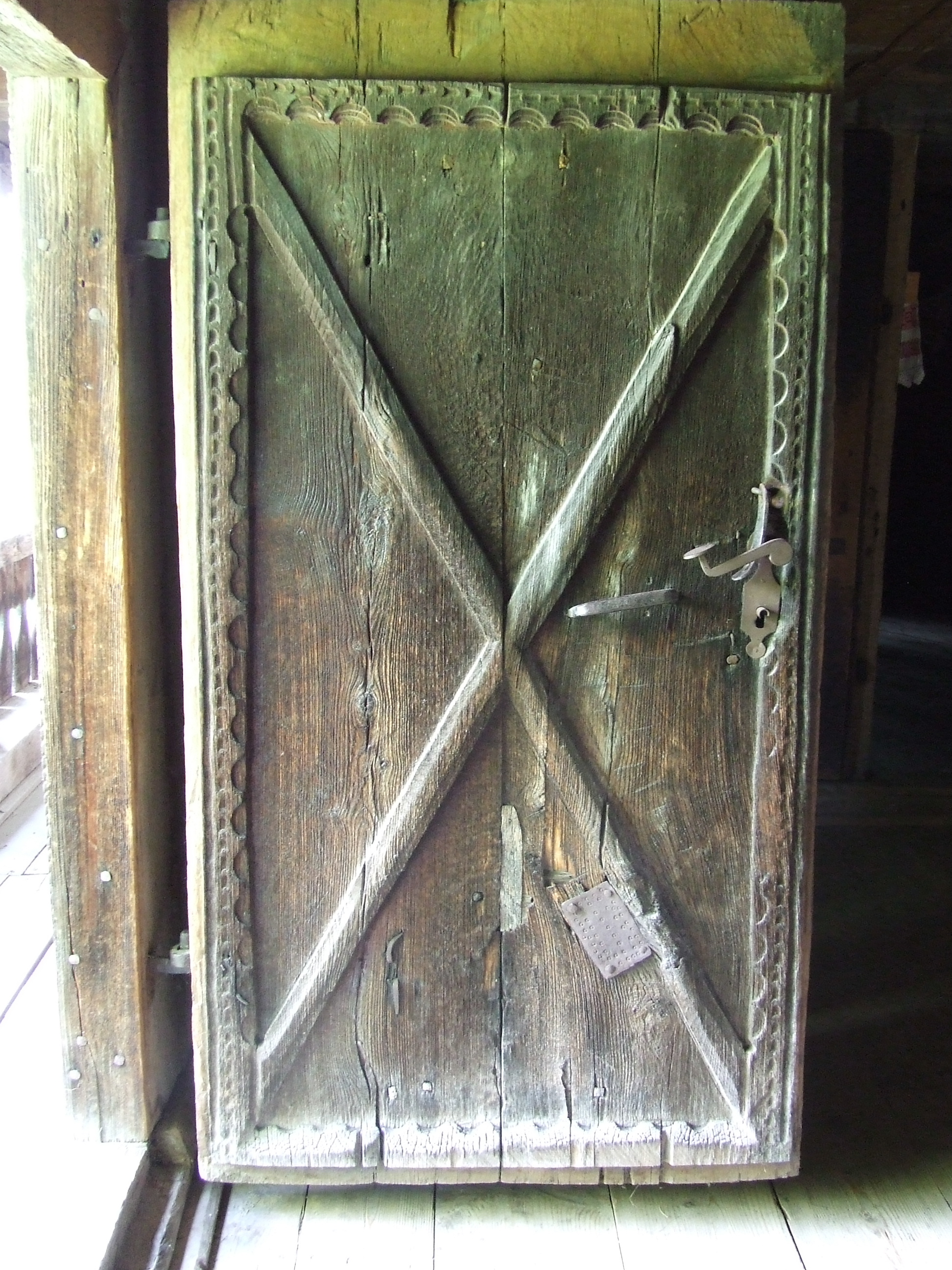 Biserica de lemn din Beznea. Uşa de la intrarea în naosul bisericii.